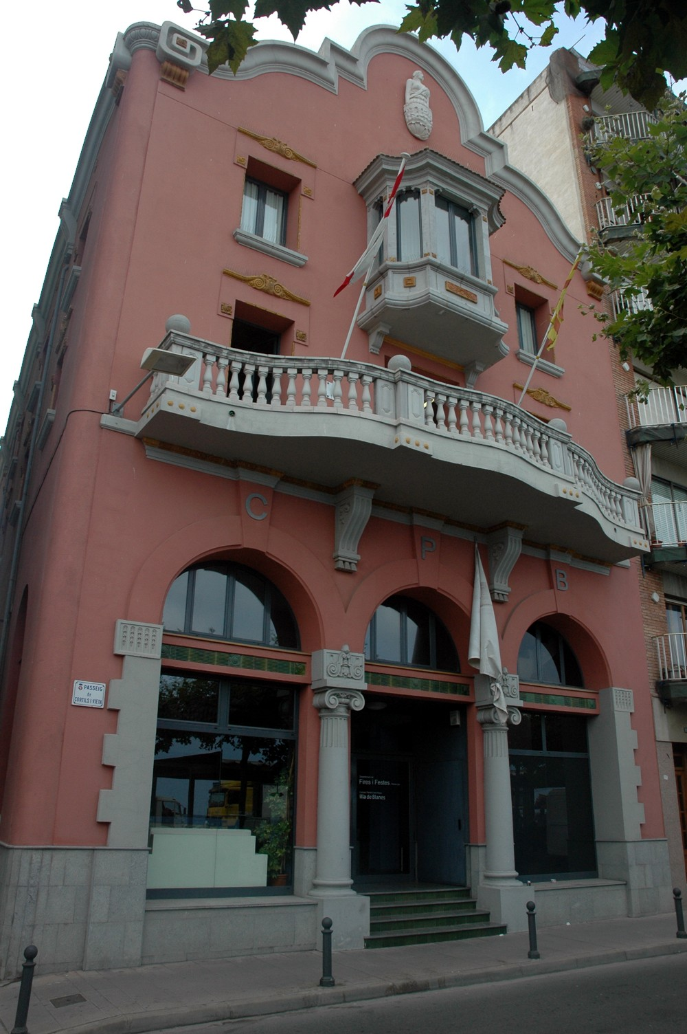 Casa del poble, Blanes, Girona, (Catalunya).